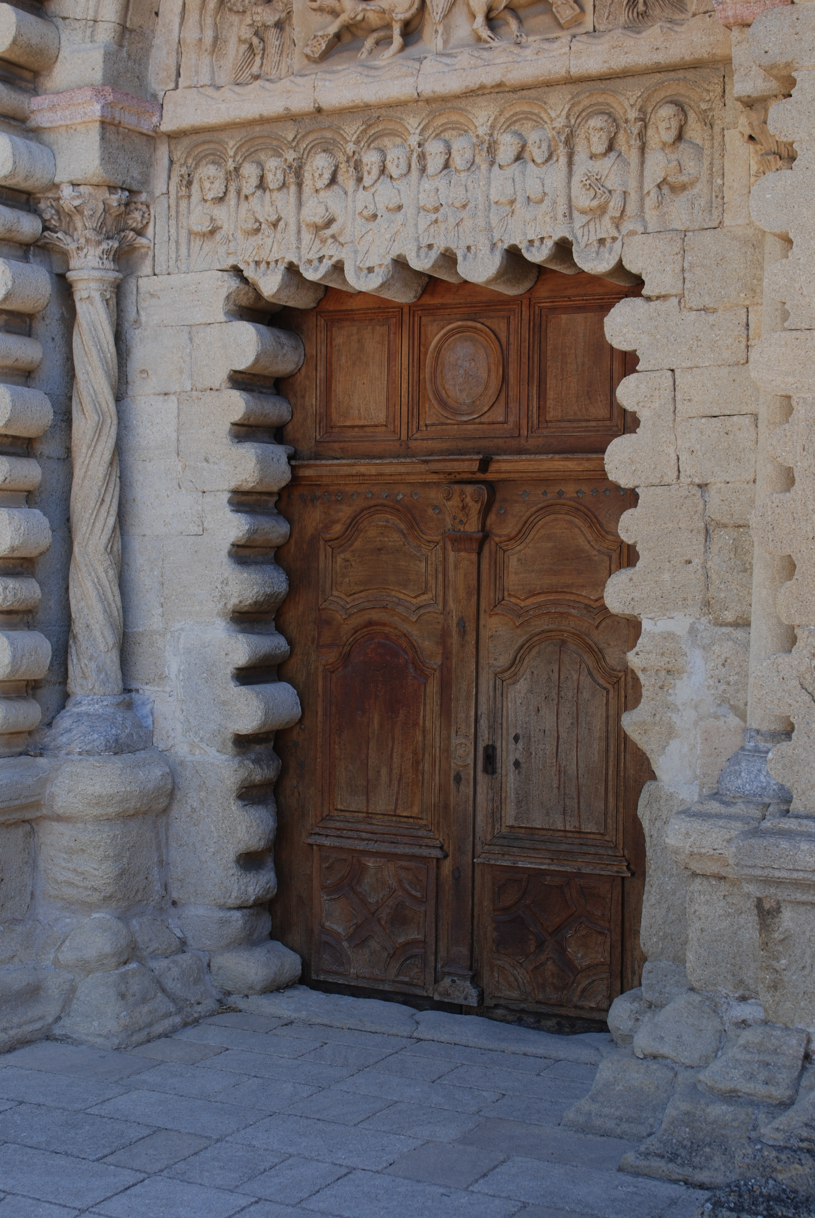 Hauptportal, Kloster Ganagobie, Département Alpes-de-Haute-Provence, (France)